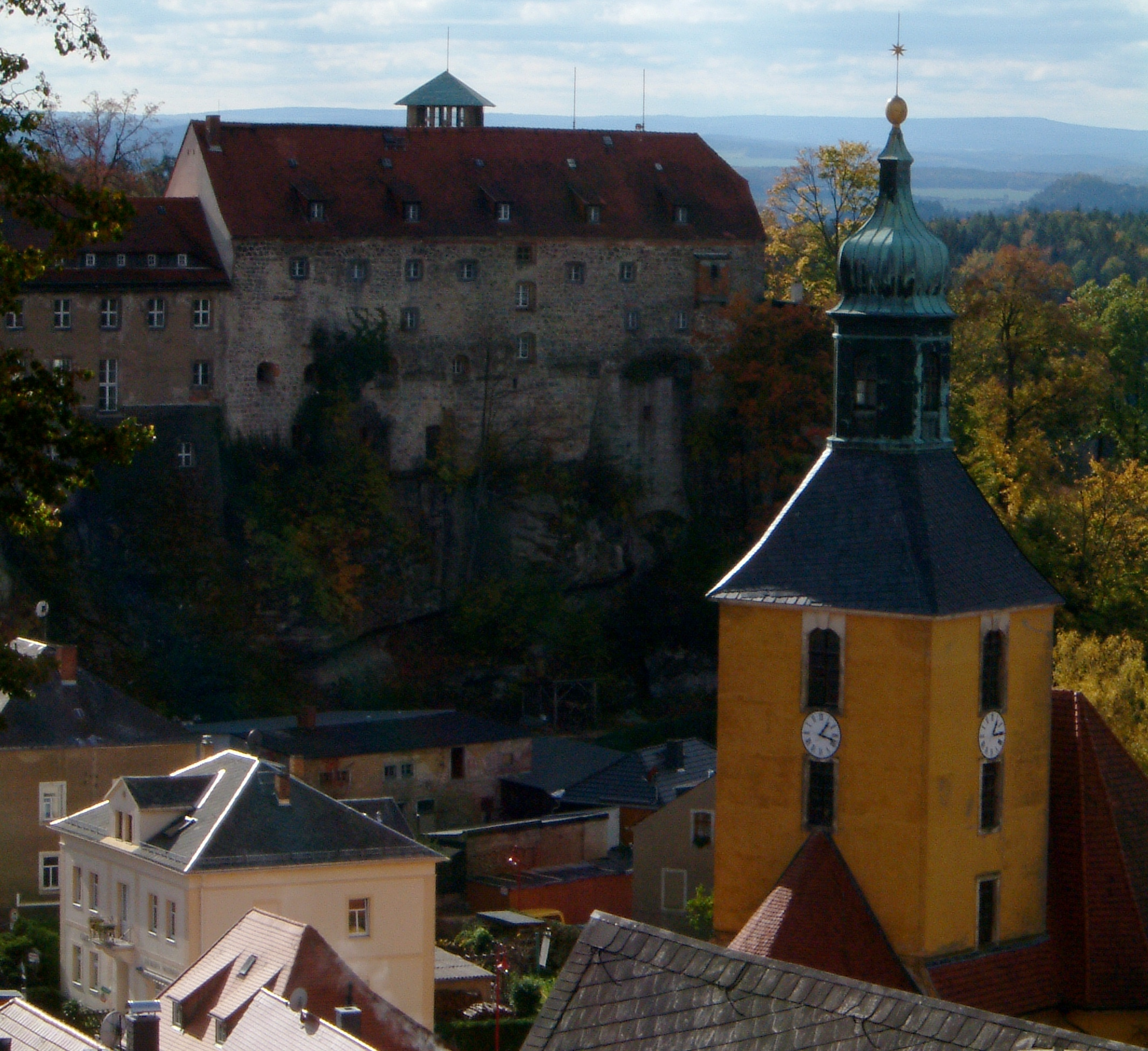 Hohnstein